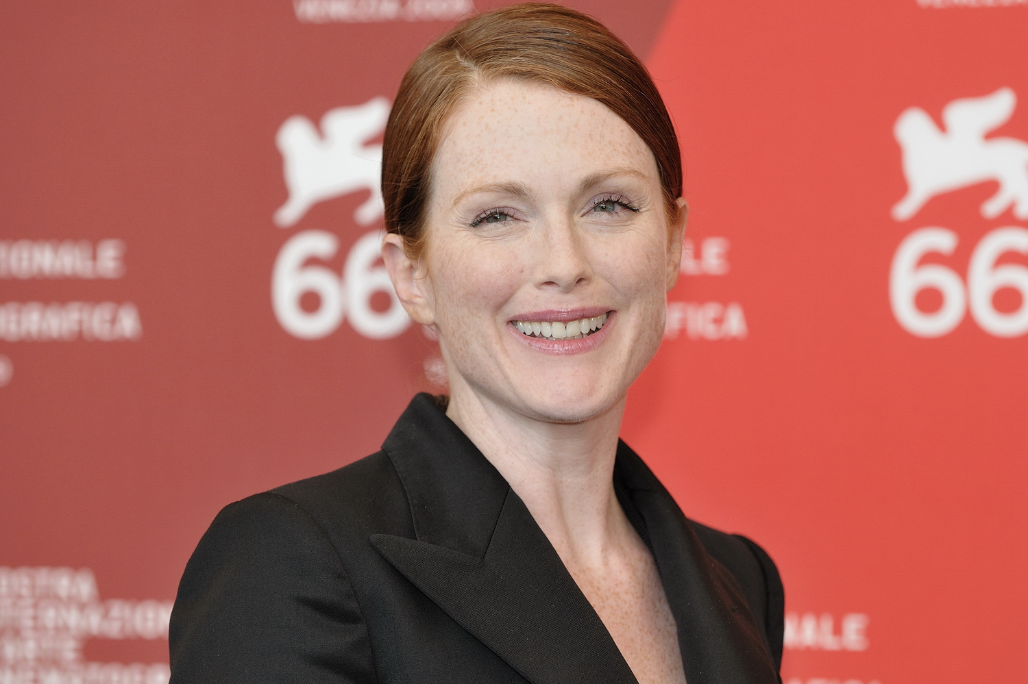 66ème Festival du Cinéma de Venise (Mostra), 10ème jour (11/09/2009) Photocall avec Colin Firth, Julianne Moore, Matthew Goode et le réalisateur Tom Ford pour le film : A sigle Man